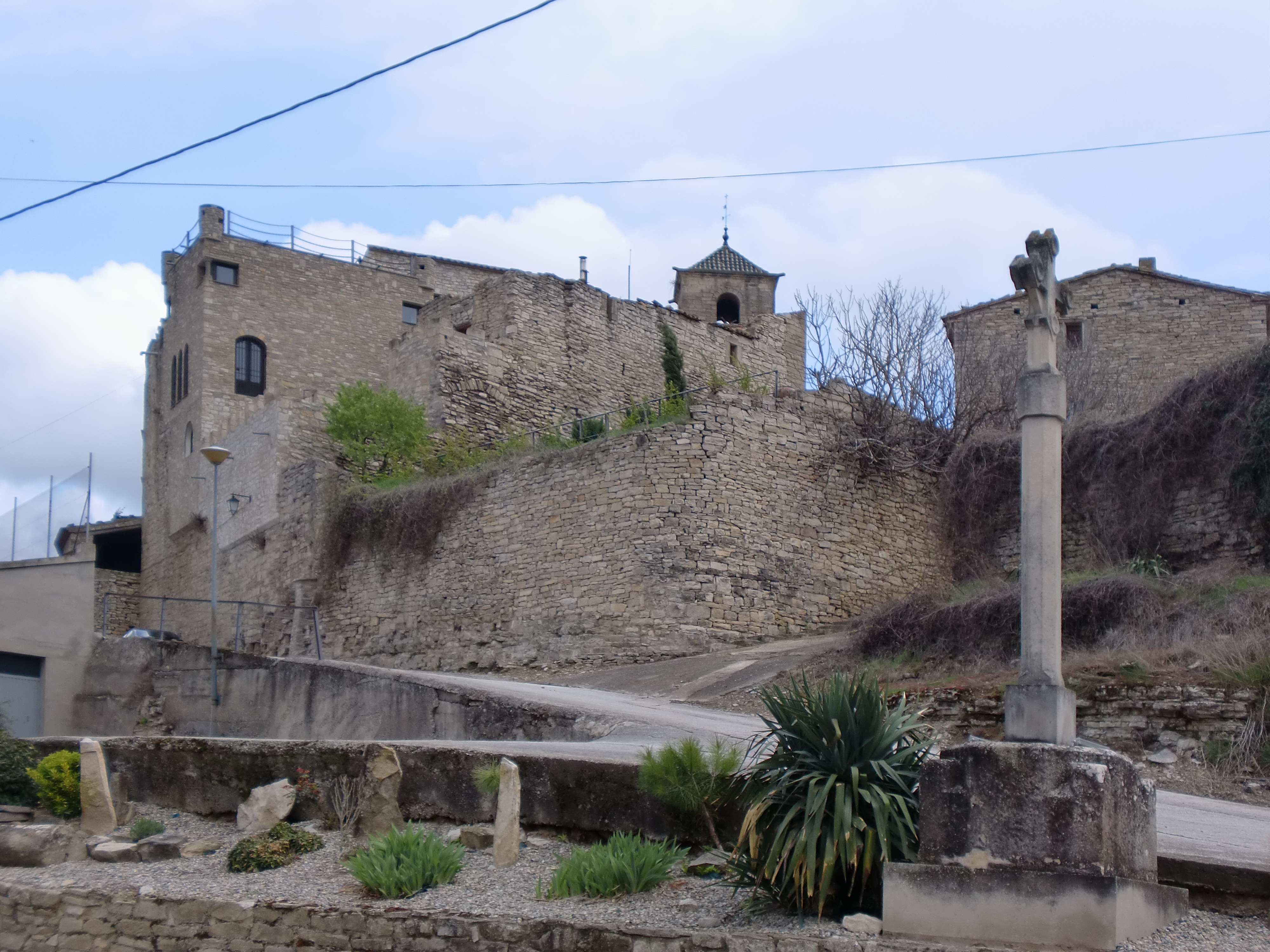 Vallfogona de Riucorb Castell Templers